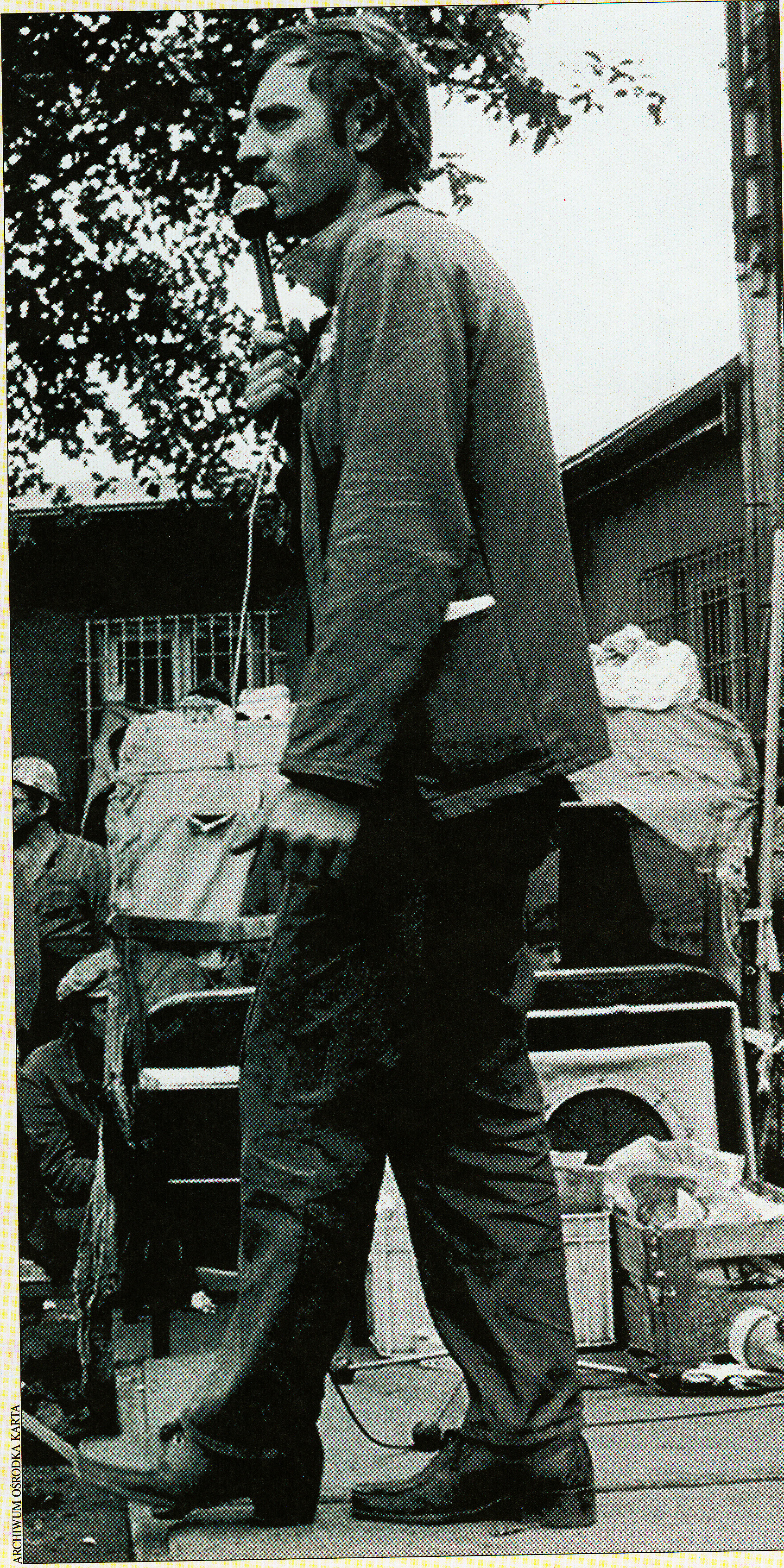 Andrzej Kolodziej w Stoczni im. Komuny Paryskiej w Gdyni, podczas strajku